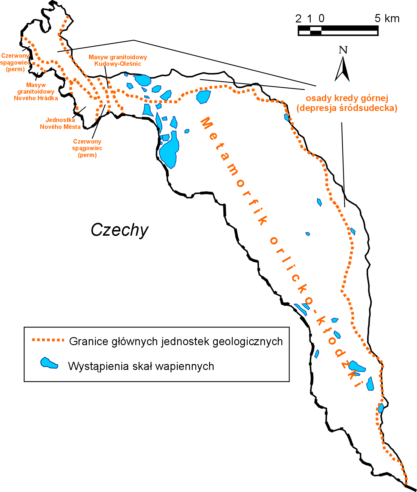 Góry Bystrzyckie, Góry Orlickie i Pogórze Orlickie - główne jednostki geologiczne, kolorem niebieskim zaznaczono występowanie skał wapiennych. Autor: M. Smoczyk, 03.2005.